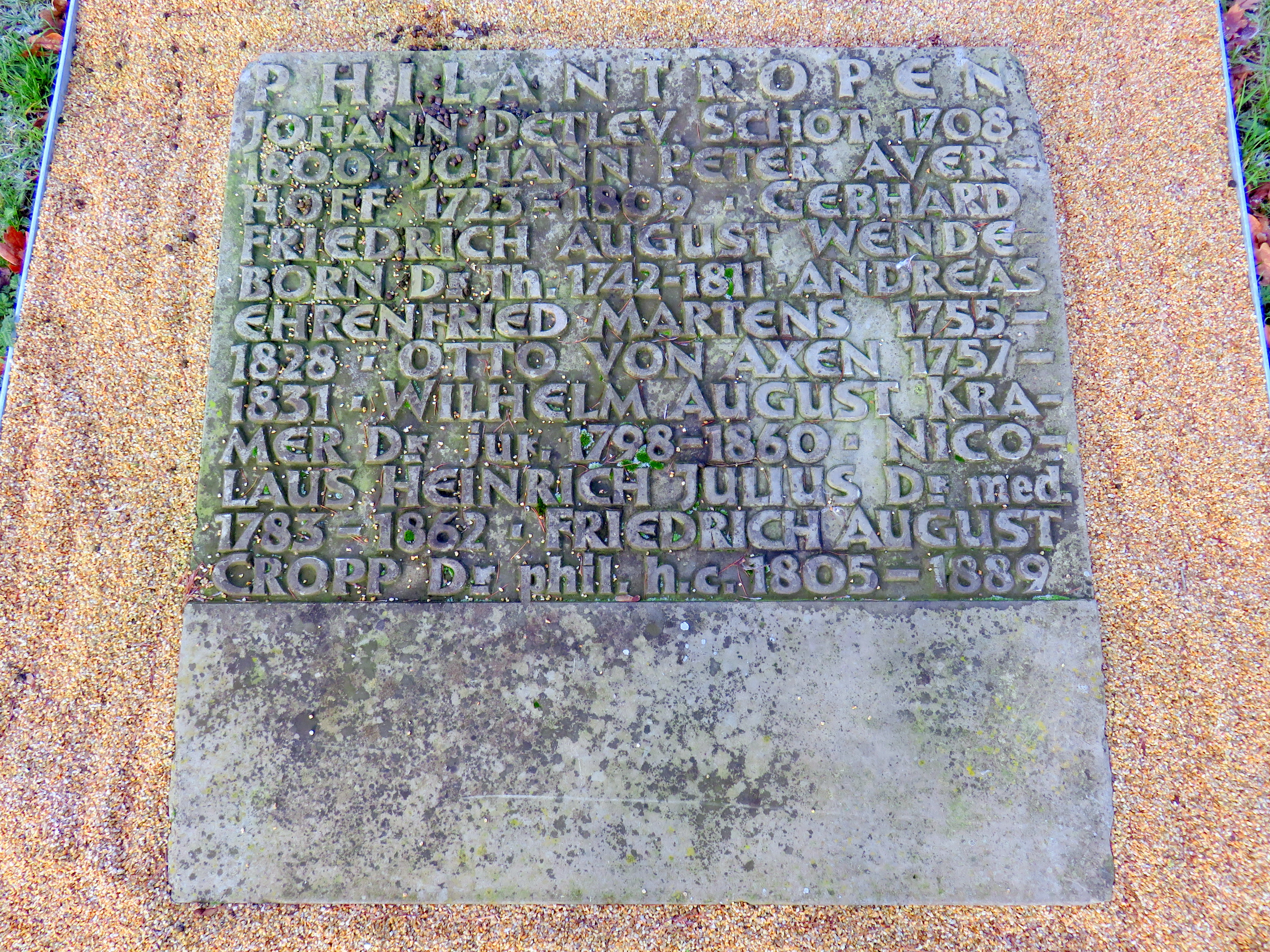 Sammelgrab Philantropen im Bereich des Althamburgischen Gedächtnisfriedhofs auf dem Hamburger Friedhof Ohlsdorf zu Ehren von unter anderem Otto von Axen, Nikolaus Heinrich Julius, Friedrich Cropp.